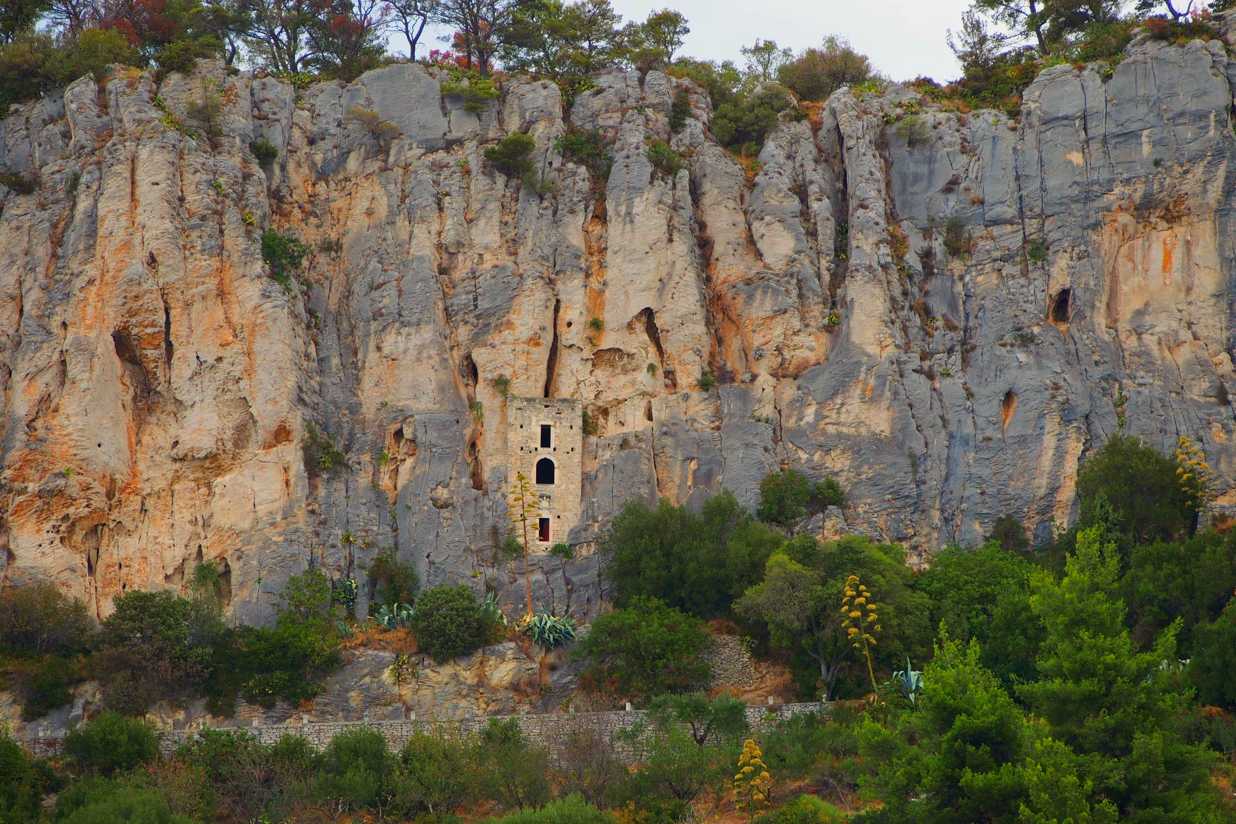 Park šuma Marijan